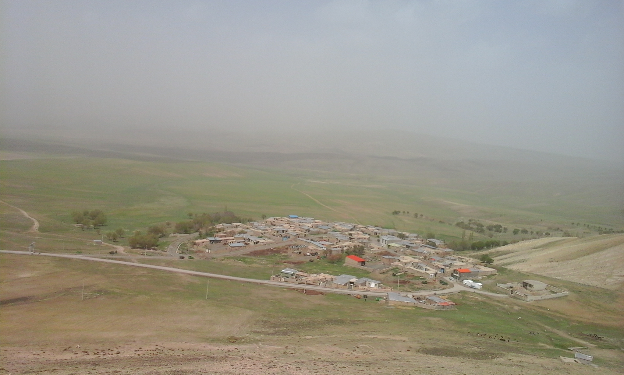 عکسی از طبیعت زیبای روستای چشمه بار